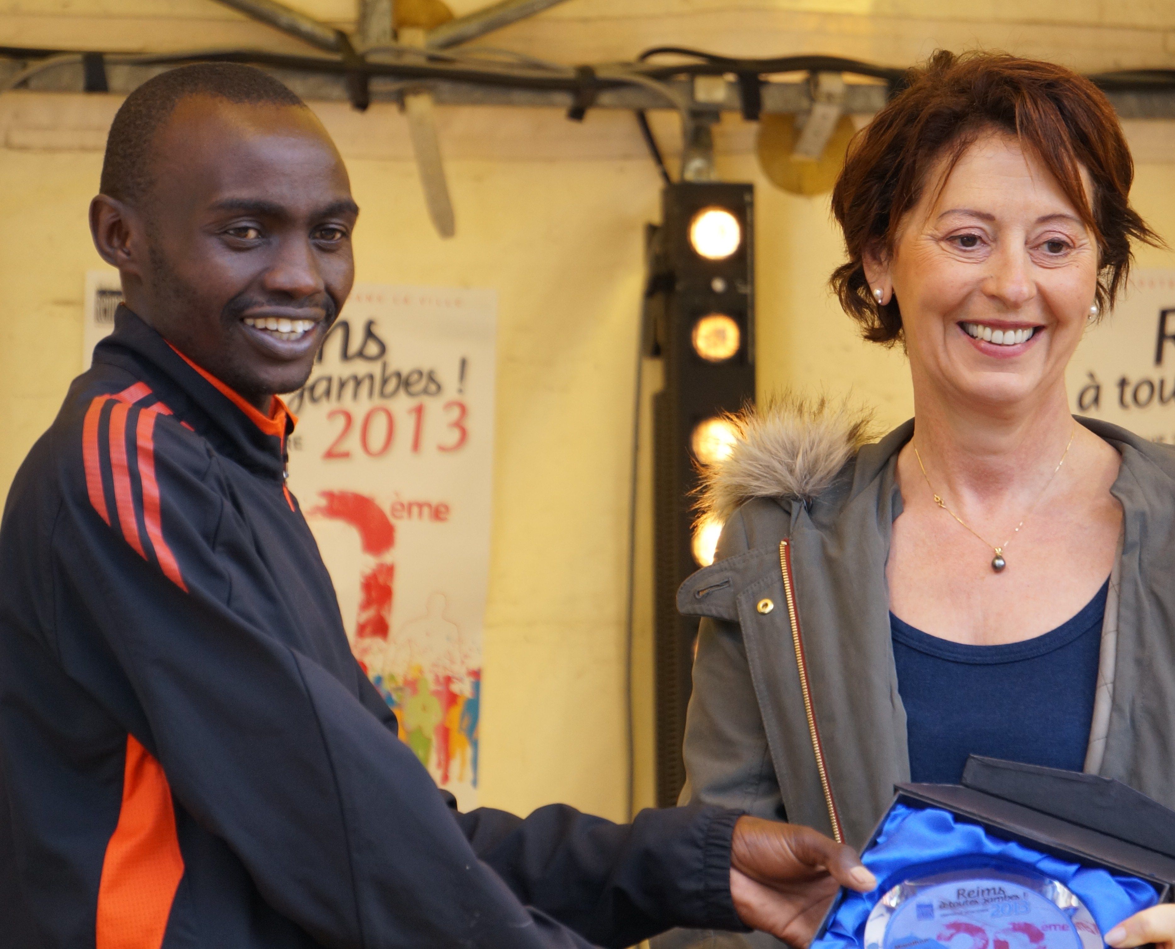 Lors de Reims à Toutes Jambes 2013 .